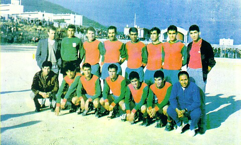 Photo de la composition de l'équipe de la Jeunesse sportive de Kabylie du 12 mai 1968, lors d'un match de championnat contre le Hydra AC. Match qui a vu la victoire de la JSK 4 à 0. De Gauche à Droite : Debout : Terzi, Sedkaoui, Terzi, Haouchine, Karamani, Djezzar, Aït-Amar, Berkani. Assis: de Gauche à Droite: Rafaï, Derridj, Djerzar, Kouffi, Kolli, Ouahabi et Benfaddah (entraîneur joueur).